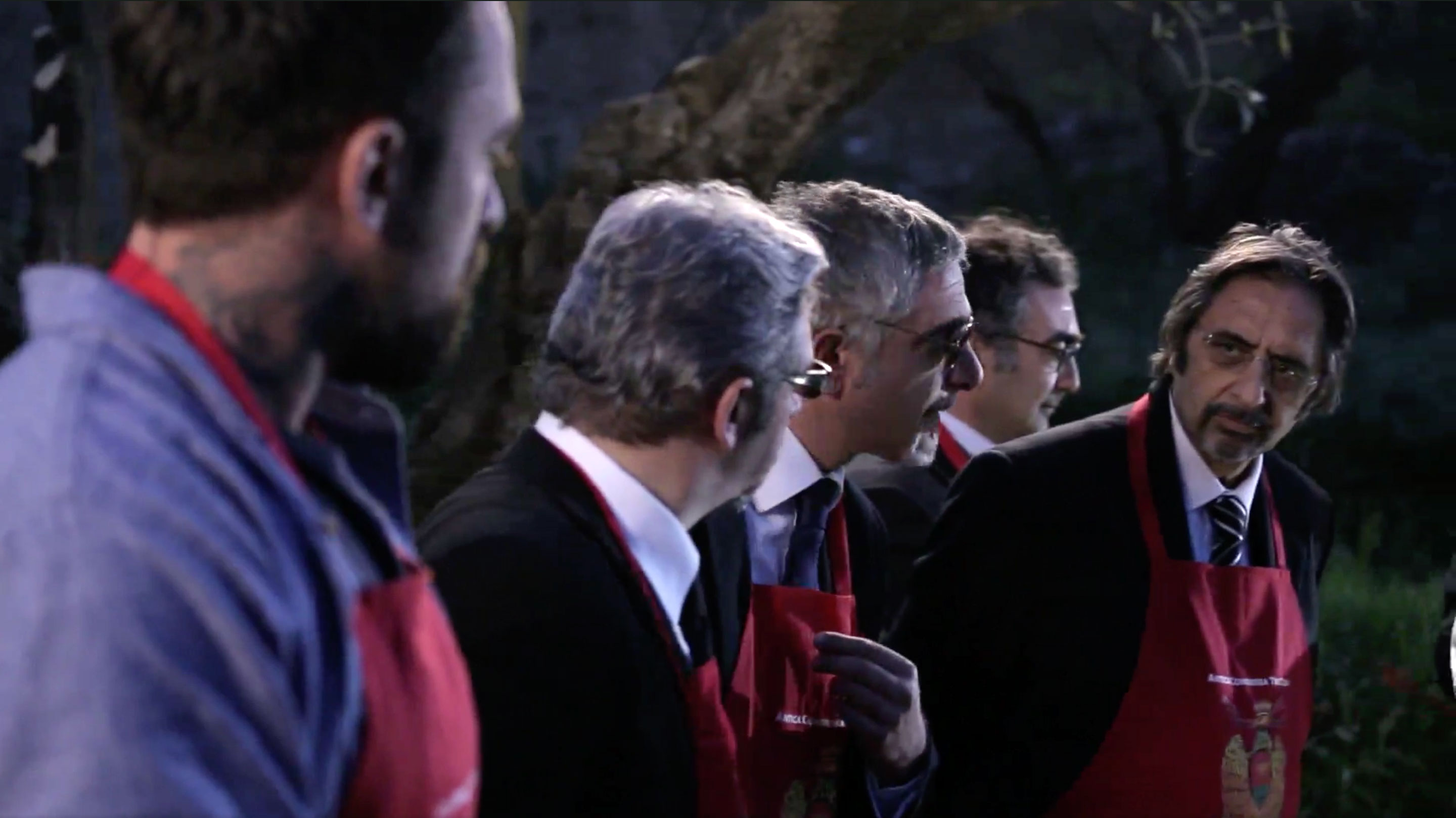 Nella scena Colacino fa parte dell'associazione che celebra l’Illustrissimo protagonista della cucina tradizionale di Catanzaro, il Morzello. Chef Rubio è alle prese con questa strana setta segreta, nella finzione chiamata "Uomini col Morzello"